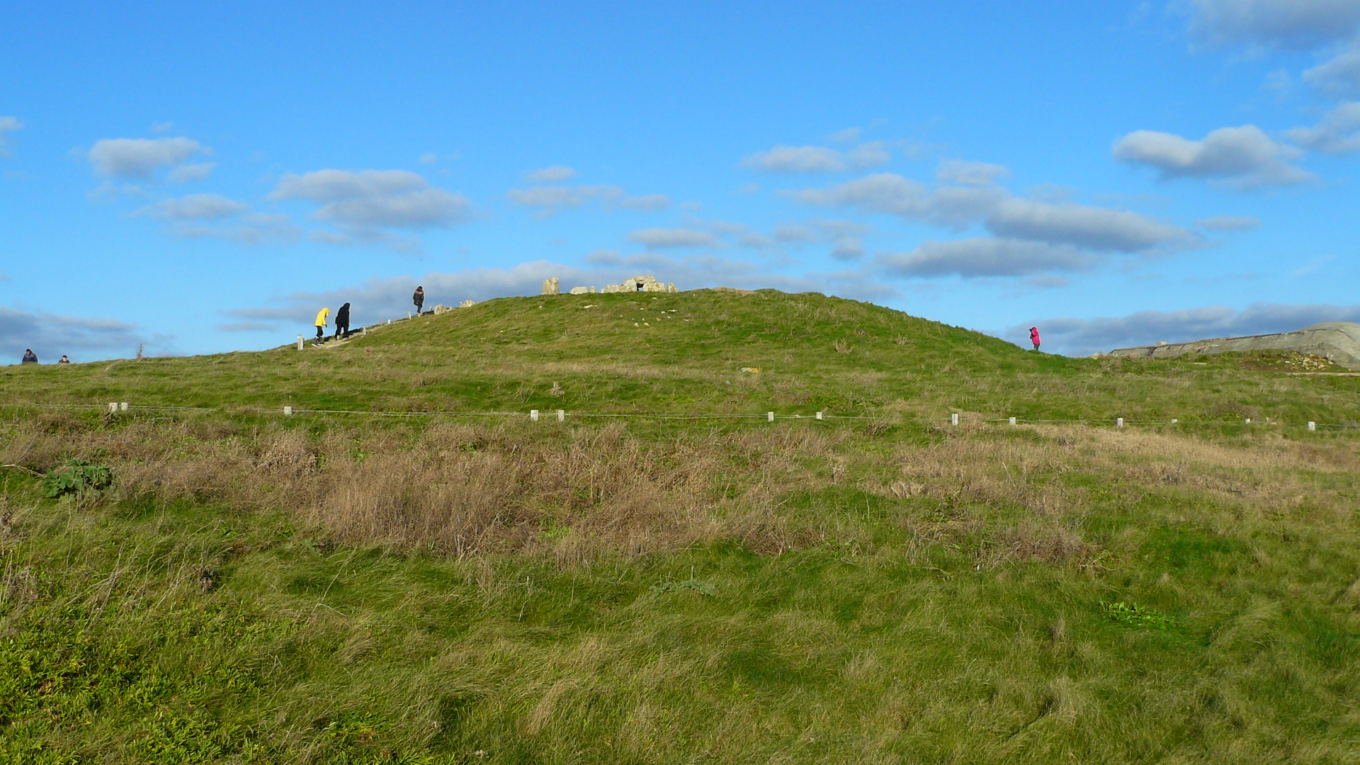 Tumulus de Beg an Dorchenn (pointe de la Torche), en Plomeur, pays Bigouden, Finistère, Bretagne. Au sommet, le dolmen.